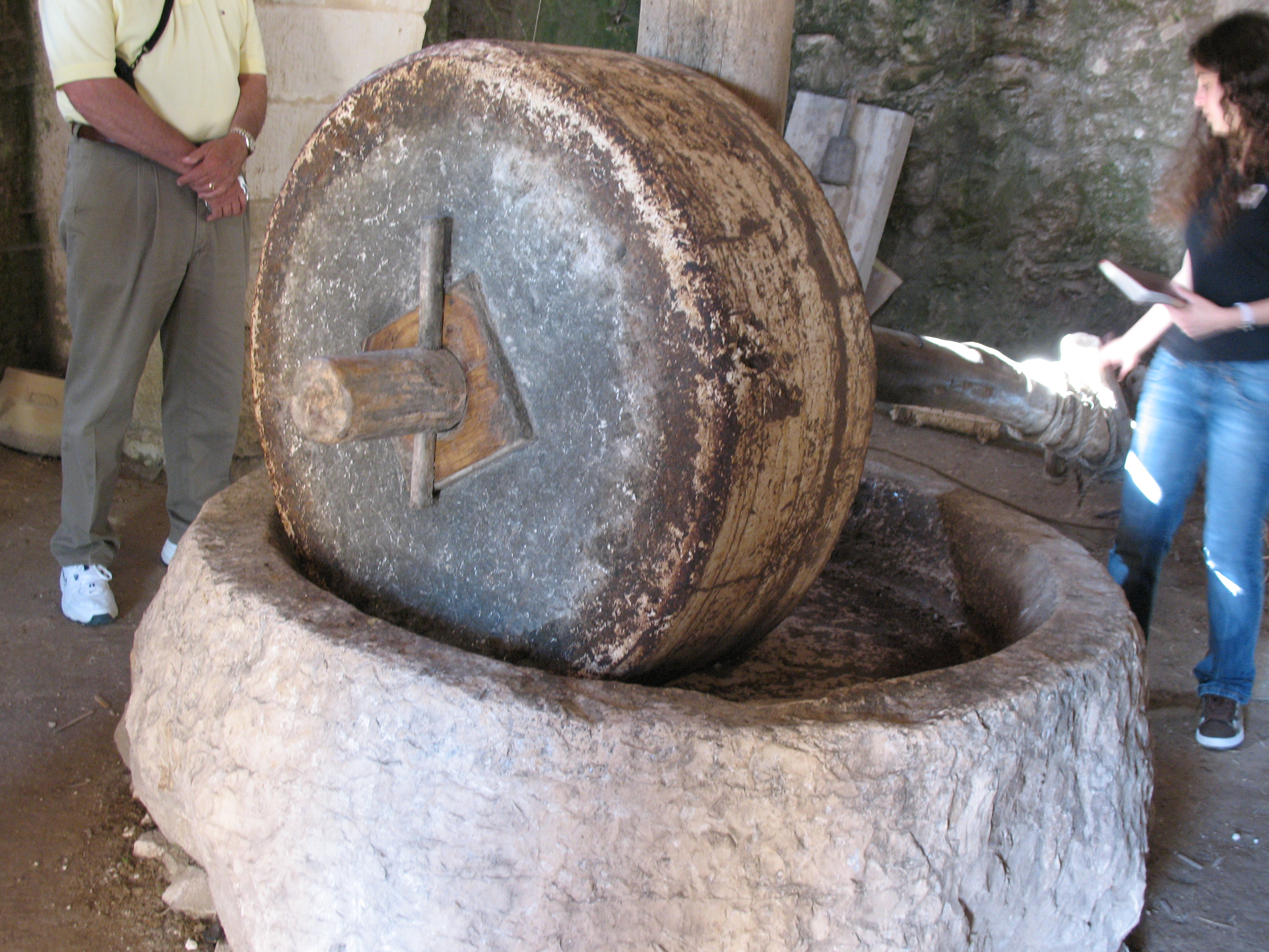 Moulin à triturer les olives - Nazareth